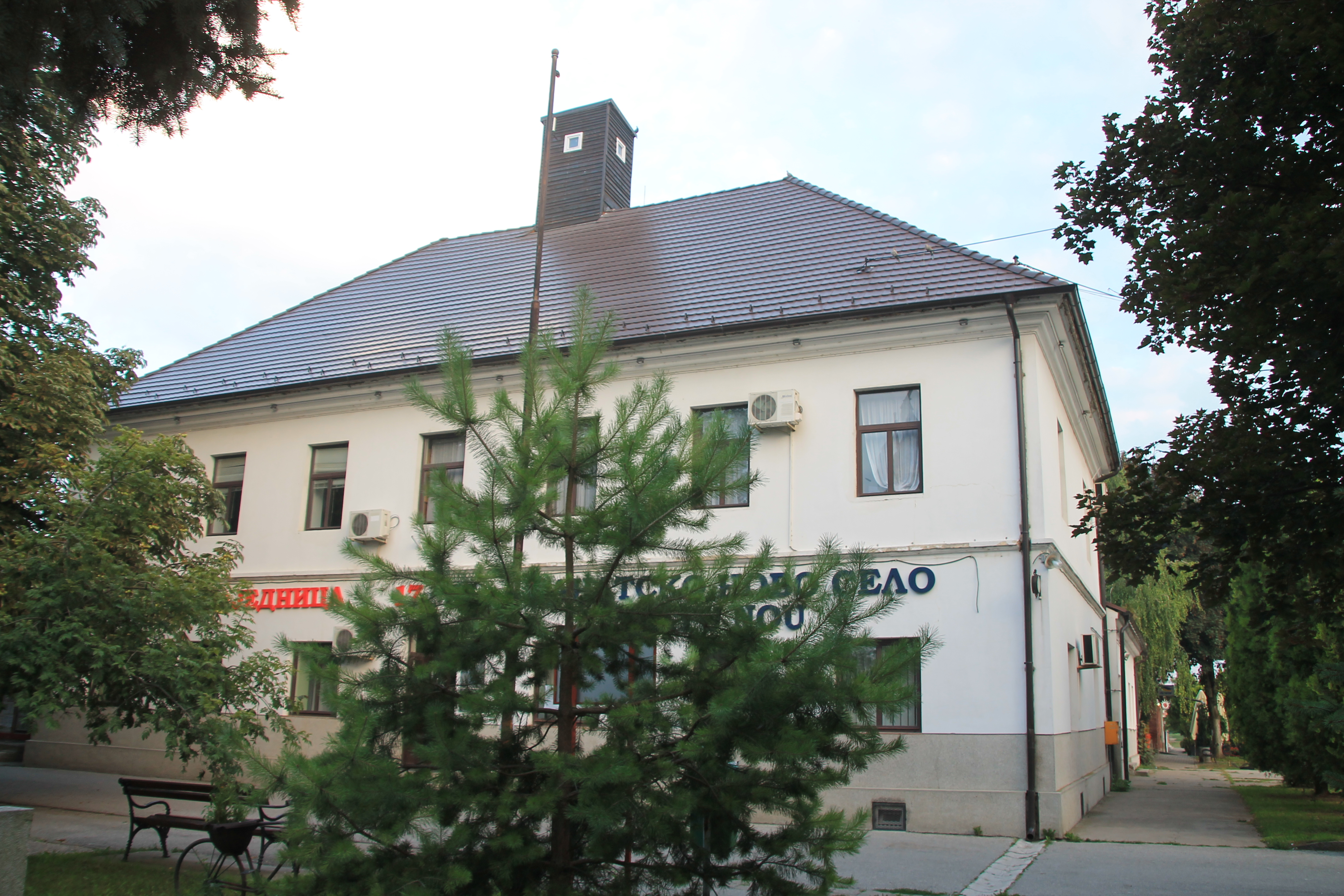 Vojnograničarska zgrada